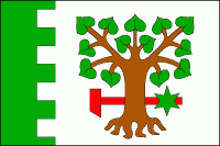 Bohdašín (RK), vlajka. Bílý list se zeleným žerďovým zubatým pruhem širokým jednu čtvrtinu délky listu se třemi čtvercovými a dvěma polovičními zuby a čtyřmi čtvercovými mezerami. Uprostřed bílého pole vykořeněná lípa se zelenými listy a hnědým kmenem, podloženým vodorovně červeným kladivem, tloukem nahoru, s topůrkem přeloženým na vlající straně listu zelenou šesticípou hvězdou. Poměr šířky k délce listu je 2:3.